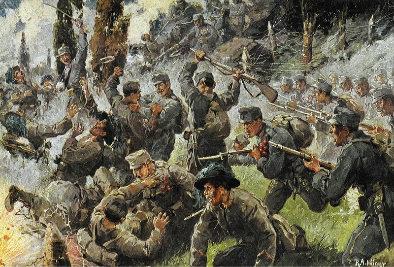 1. WK - Nahkampf auf dem Doberdo (Isonzo-Front)